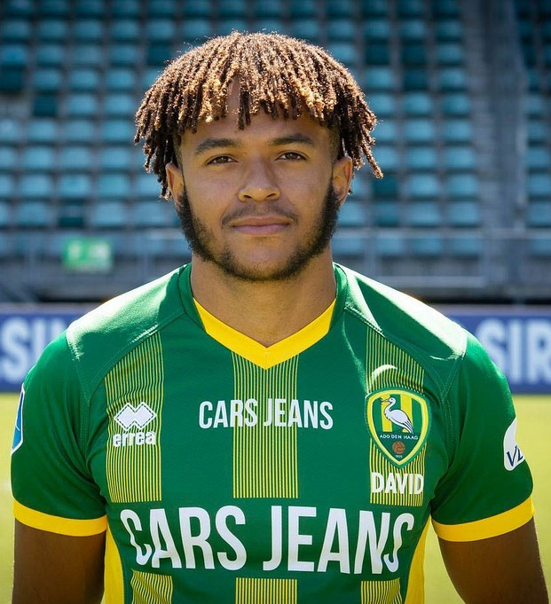 Trevor David